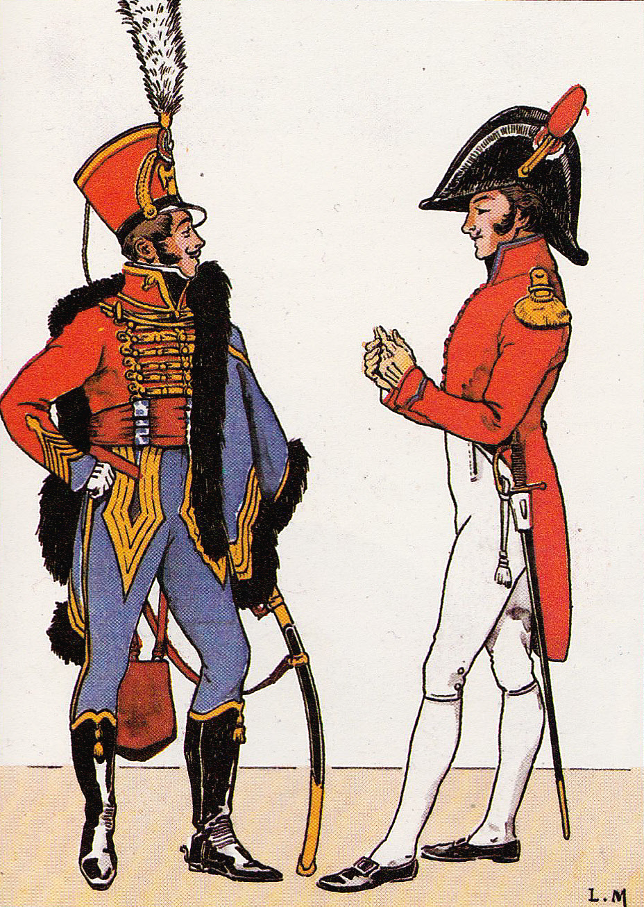 Officiers des hussards Jérôme-Napoléon en grande tenue et tenue de société, 1814. Cdt E.-L. Bucquoy : « L'officier en shako est fait d'après une planche de l'historique du 13ème Hussards. [...] L'officier en surtout est d'après la planche de l'historique de Titeux. »